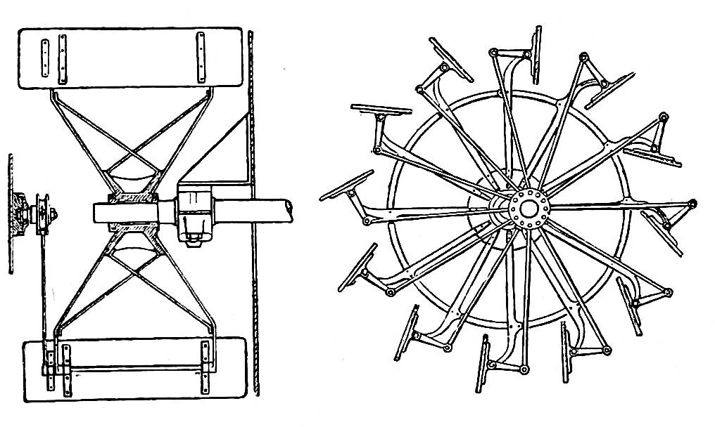 Эта фотография была использована для иллюстрирования статьи «Колесо гребное» опубликованной в тринадцатом томе «Военной энциклопедии», который был издан книгоиздательским товариществом И. Д. Сытина в 1913 году в столице Российской империи городе Санкт-Петербурге. Более подробное описание к этой картинке можно прочесть в указанной выше статье.